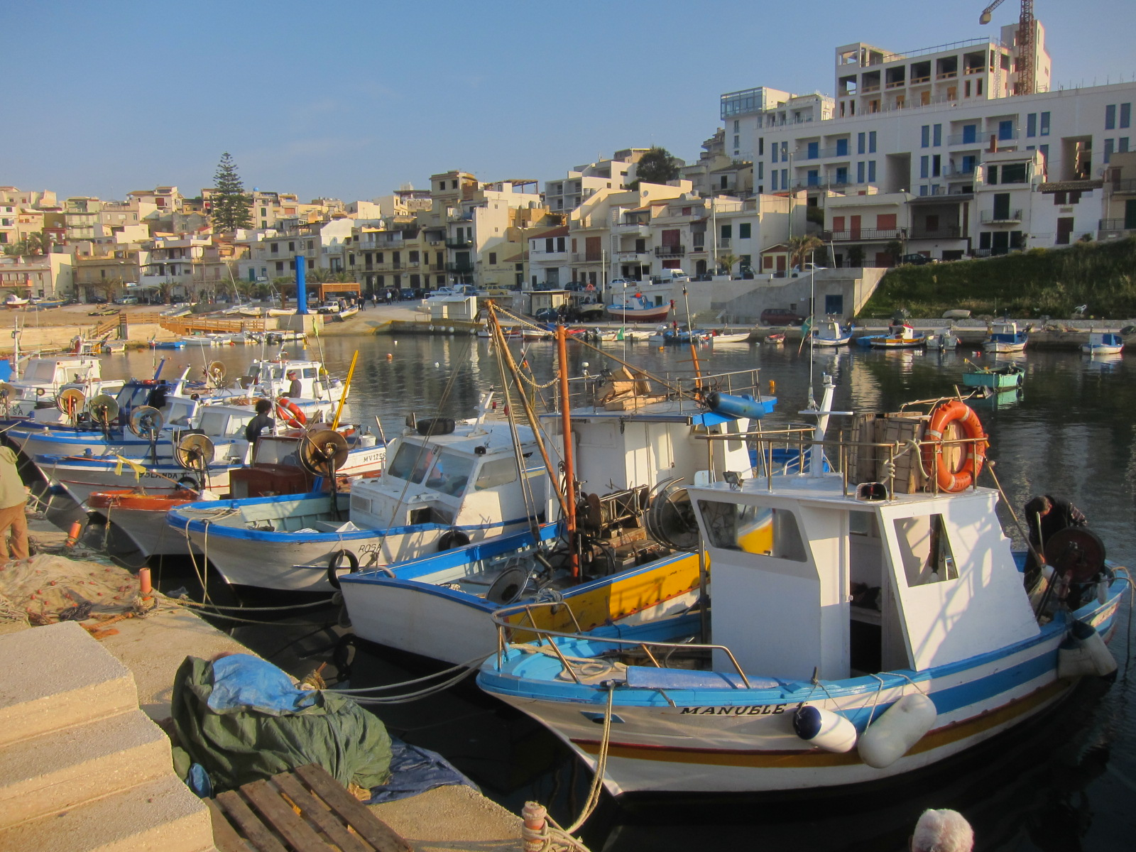 Port of Marinella di Selinunte.